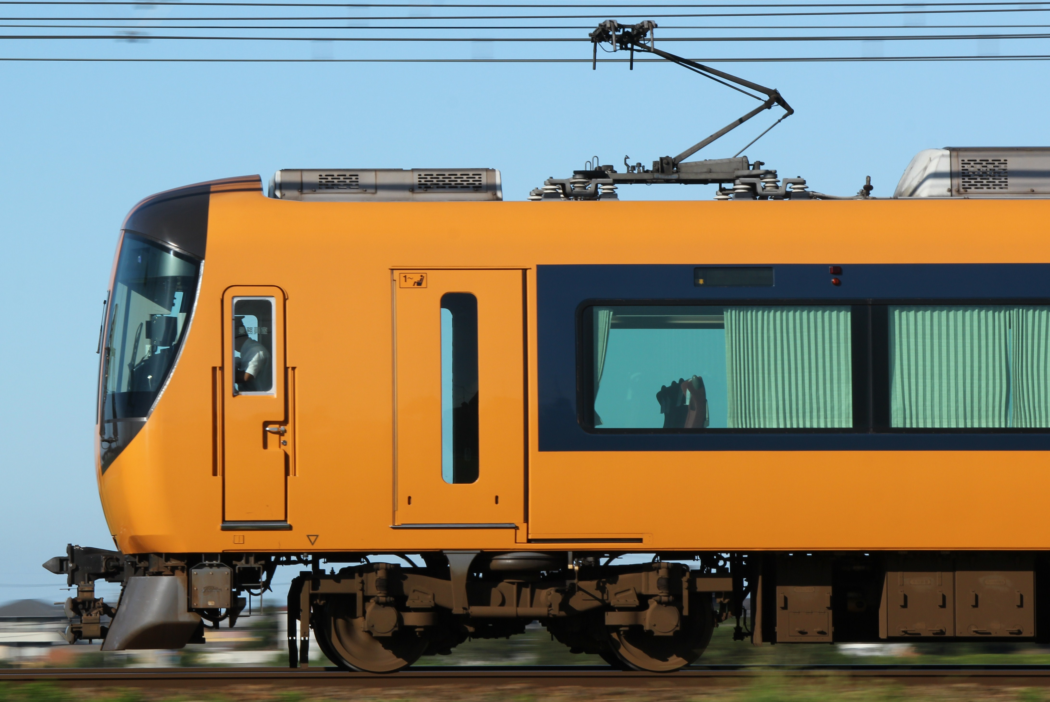 近鉄22600系サイド